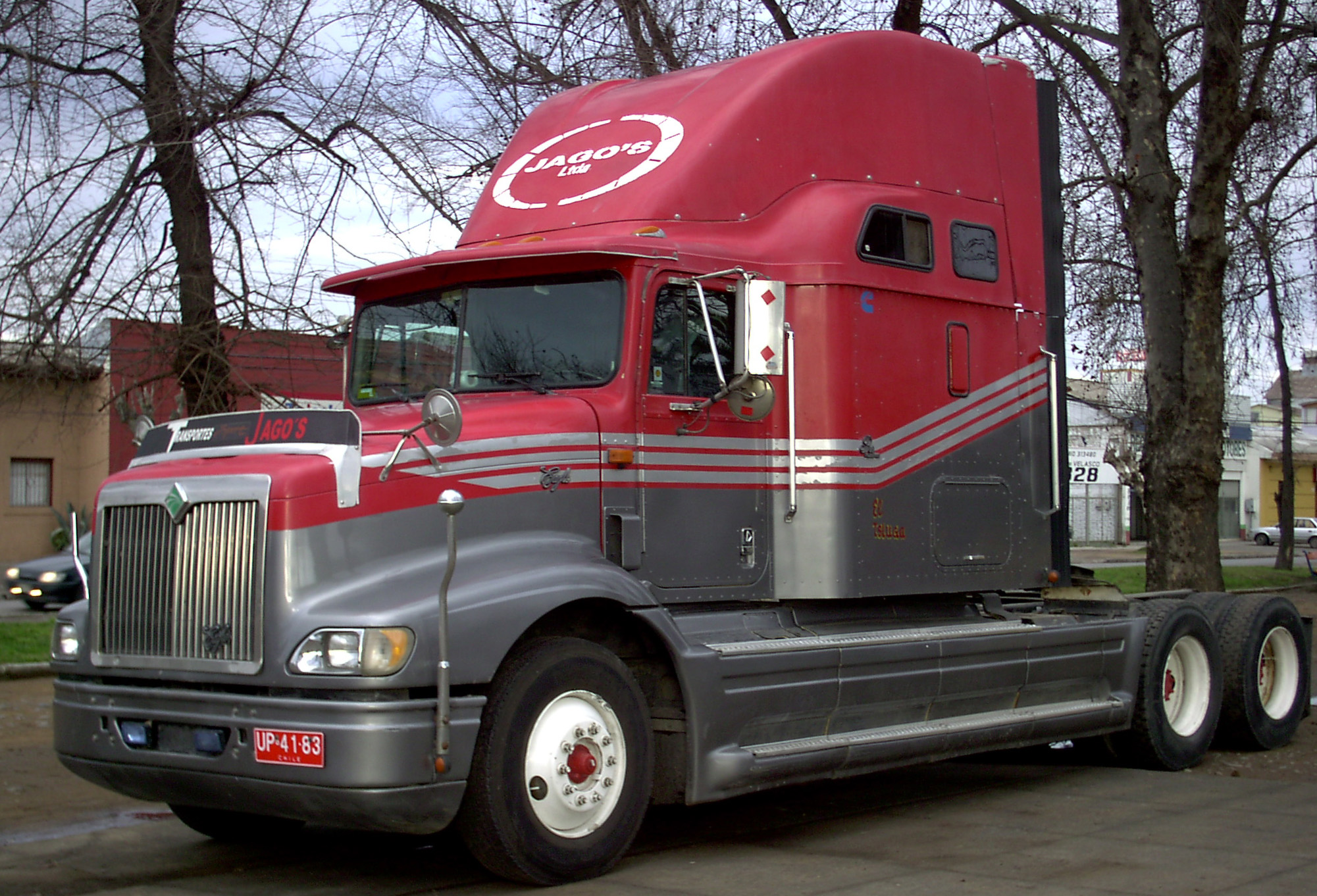 International 9200i Eagle 1998